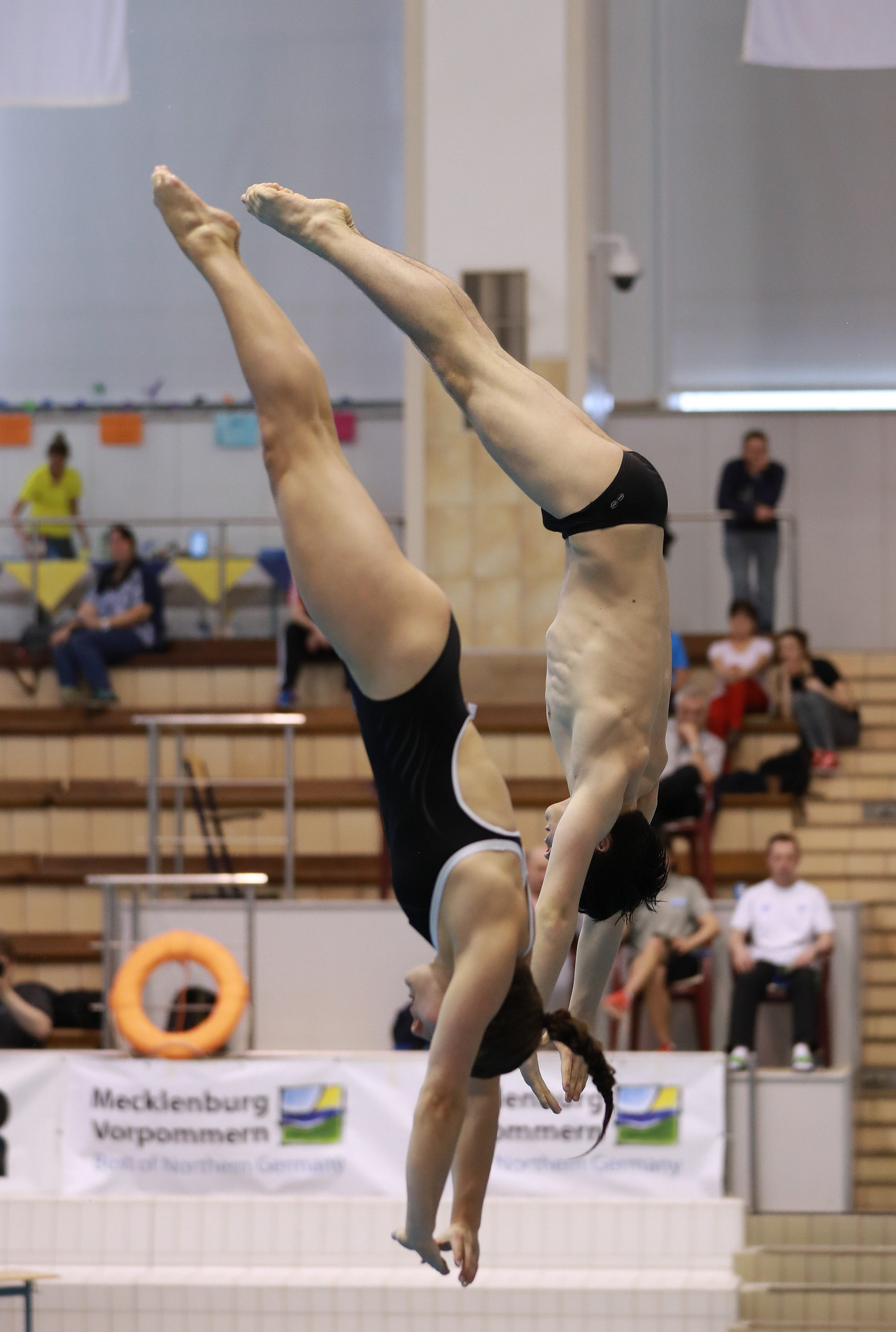 3m mixed Synchron Finale Sprung 1 bei den Internationalen Deutschen Hallenmeisterschaften im Wasserspringen Offene Klassen und Junioren. Abgebildet: Tina Punzel. Lou Massenberg.